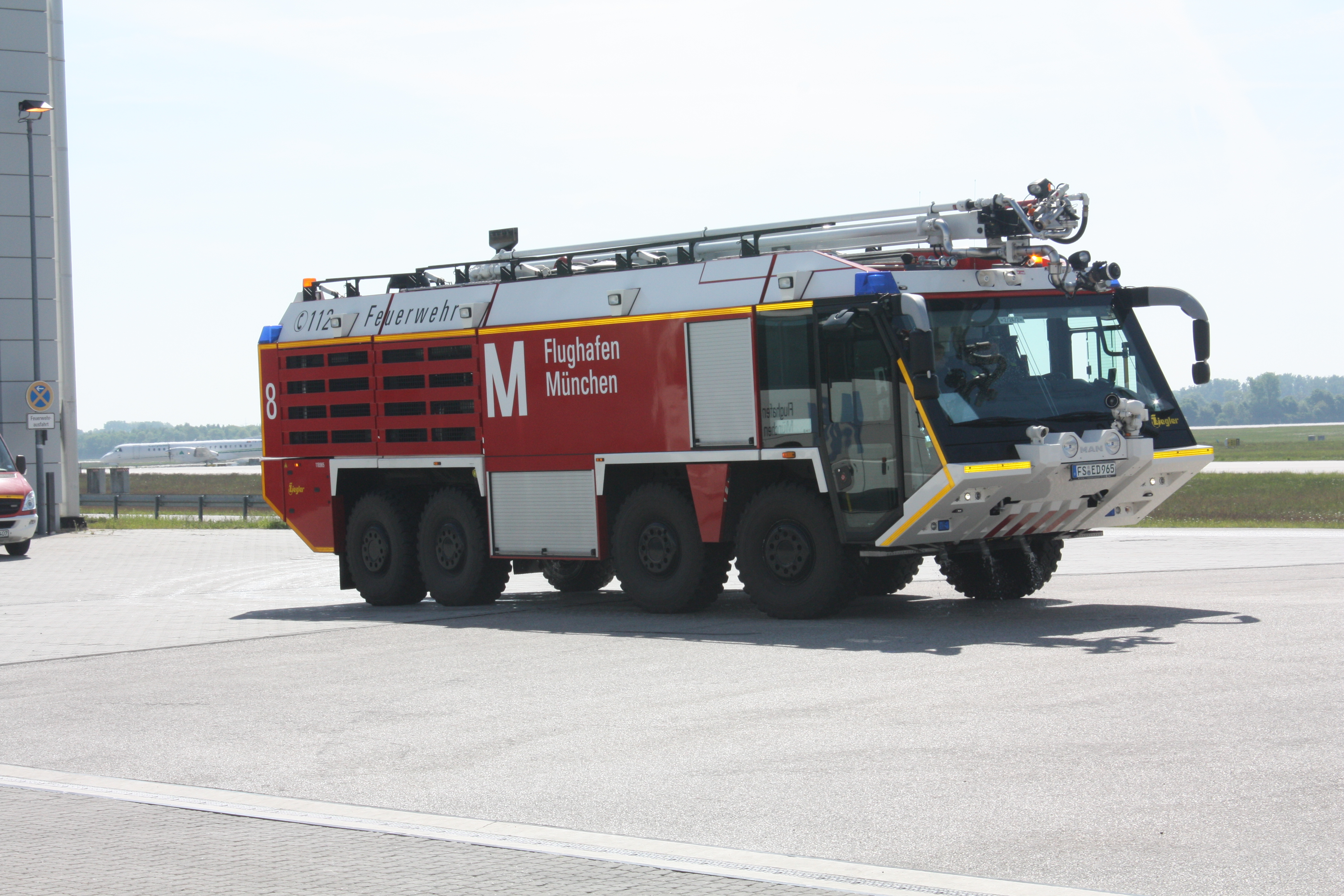 Flugfeldlöschfahrzeug Ziegler Z8, Flughafen München.